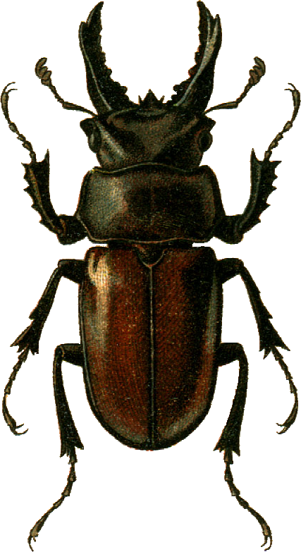 This file has been extracted from another file: Jacobs27.jpg